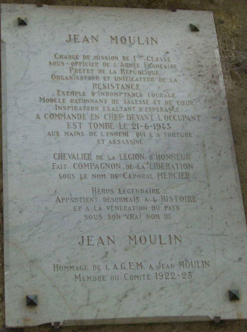 Plaque en hommage à Jean Moulin déposée par l'Association Générale des Étudiants de Montpellier